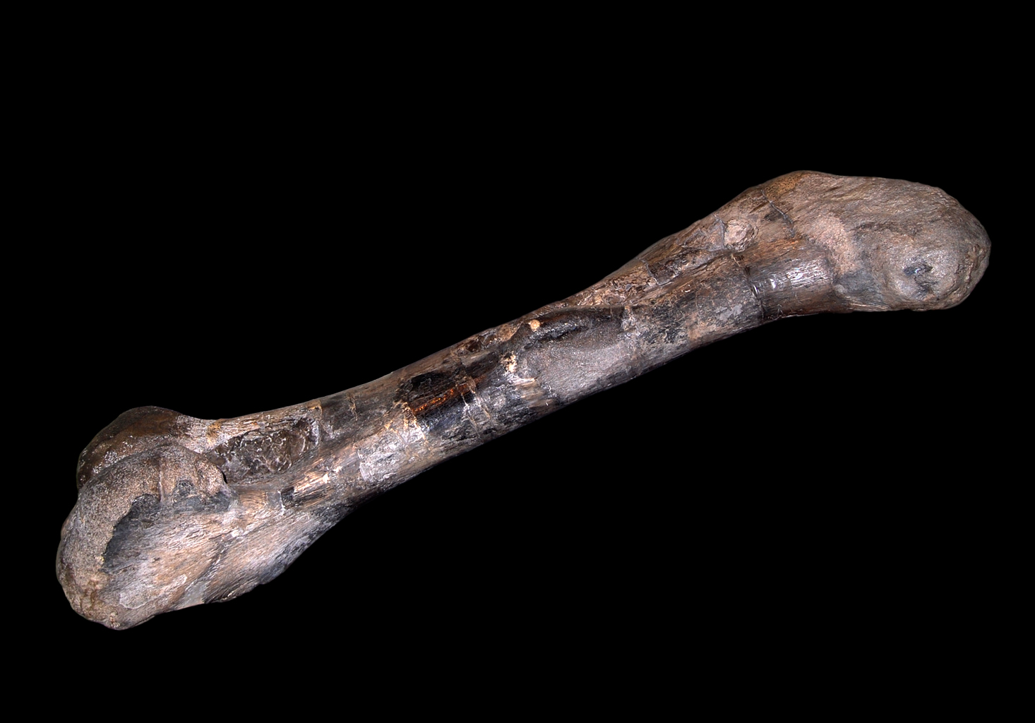 Naturhistorisches Museum Wien